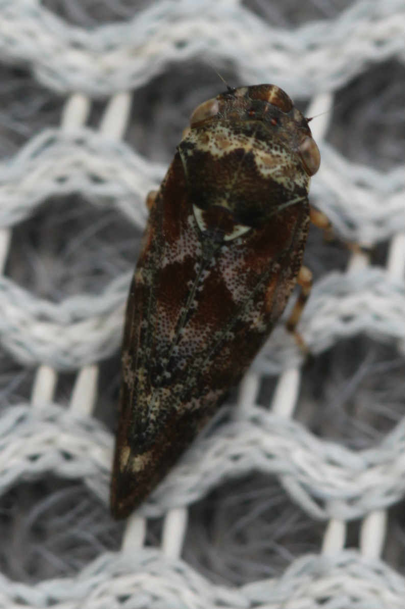 Kiefernschaumzikade (Aphrophora corticea) am 3.6.2017 in der Schwetzinger Hardt